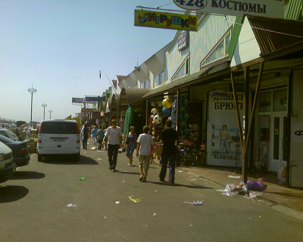 Seventh-Kilometer Market in Odessa, Ukraine